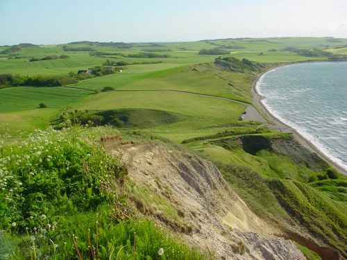 Blick auf Mors vom Hanklit